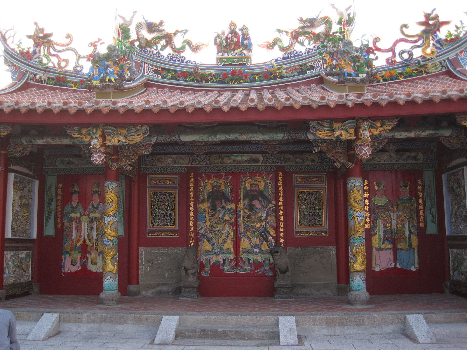 中文（台灣）: 旗山天后宮三川殿